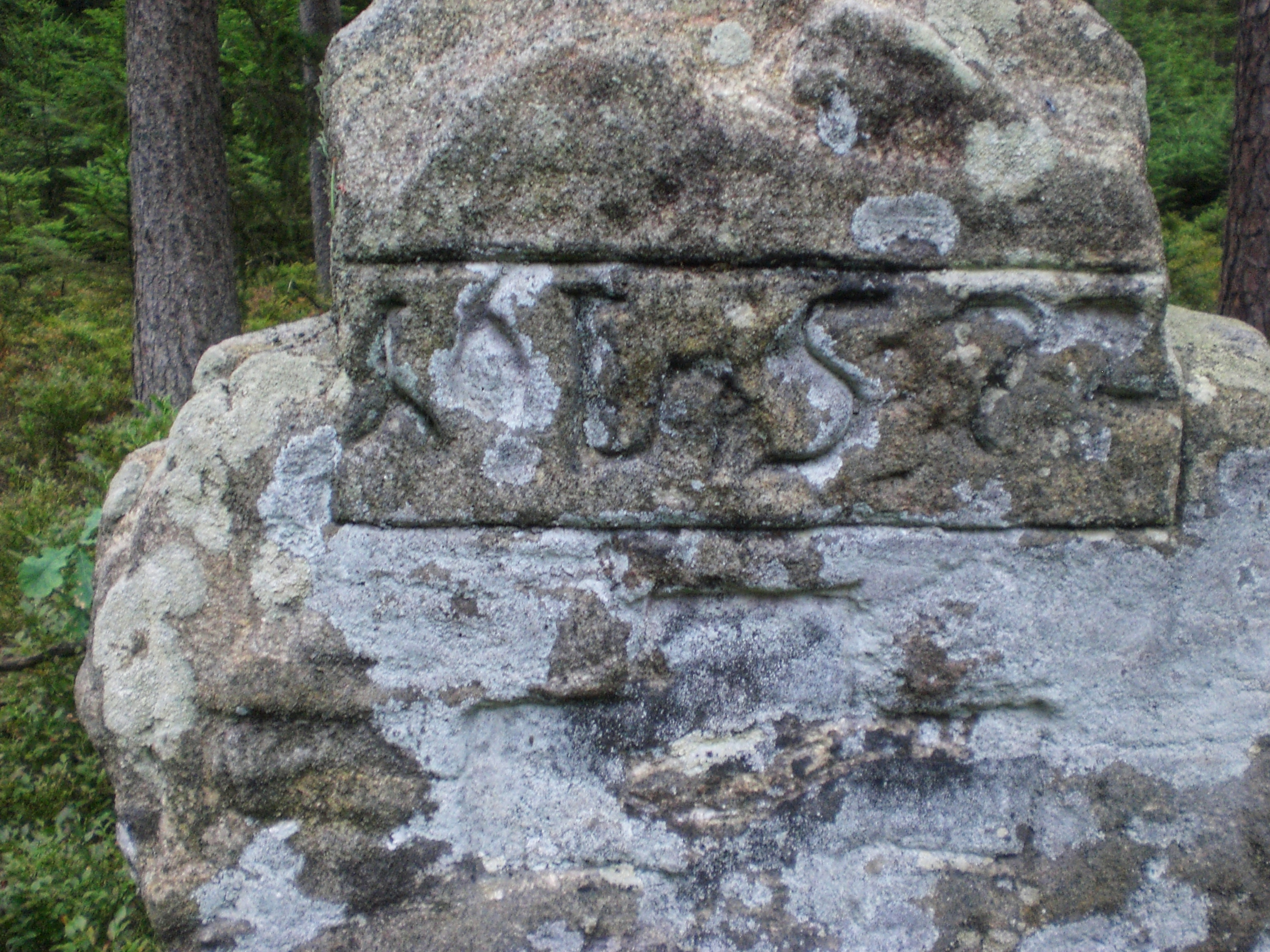 Steinkreuz nahe Weiherhaus